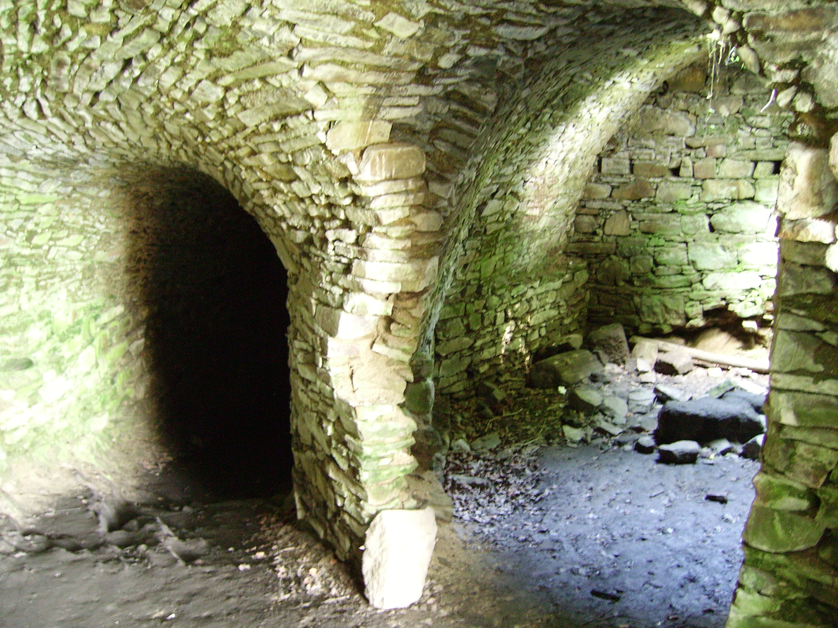 Zříceniny hradu Vikštejna